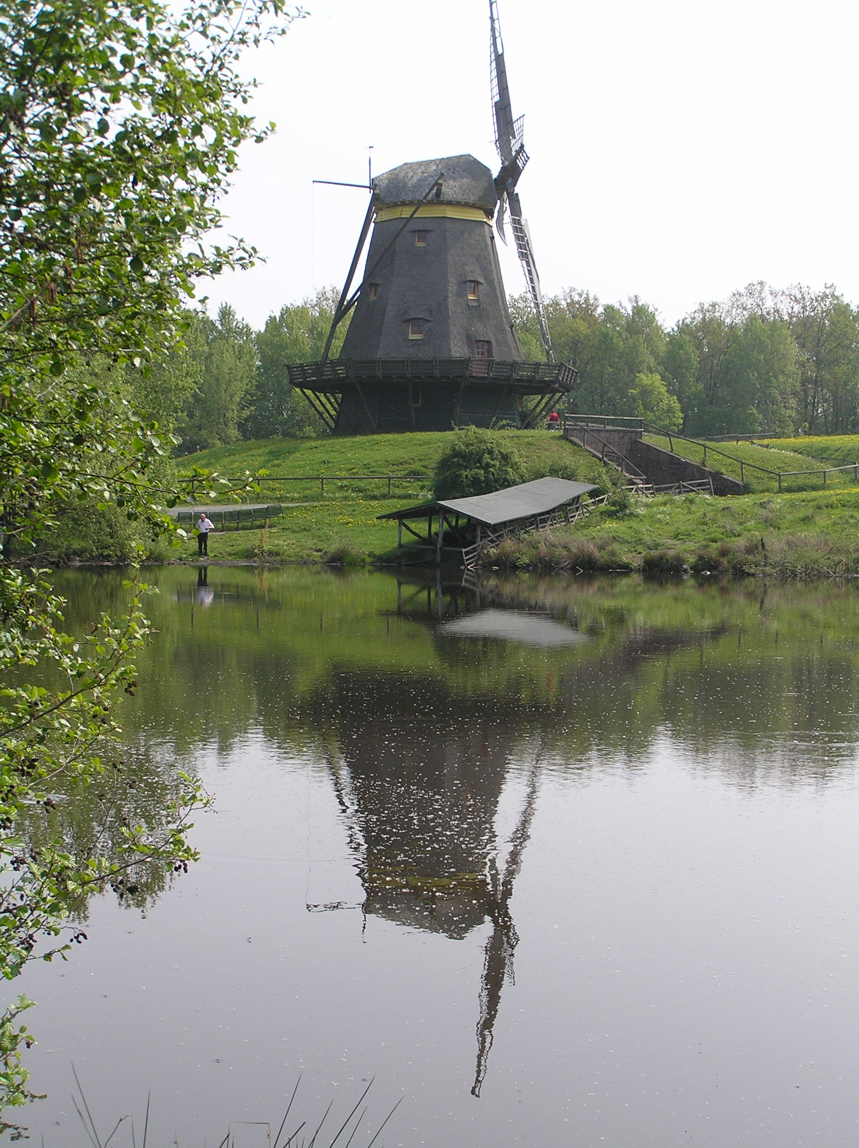 Windmühle Borsfleth im Hessenpark, Neu-Anspach, Deutschland.